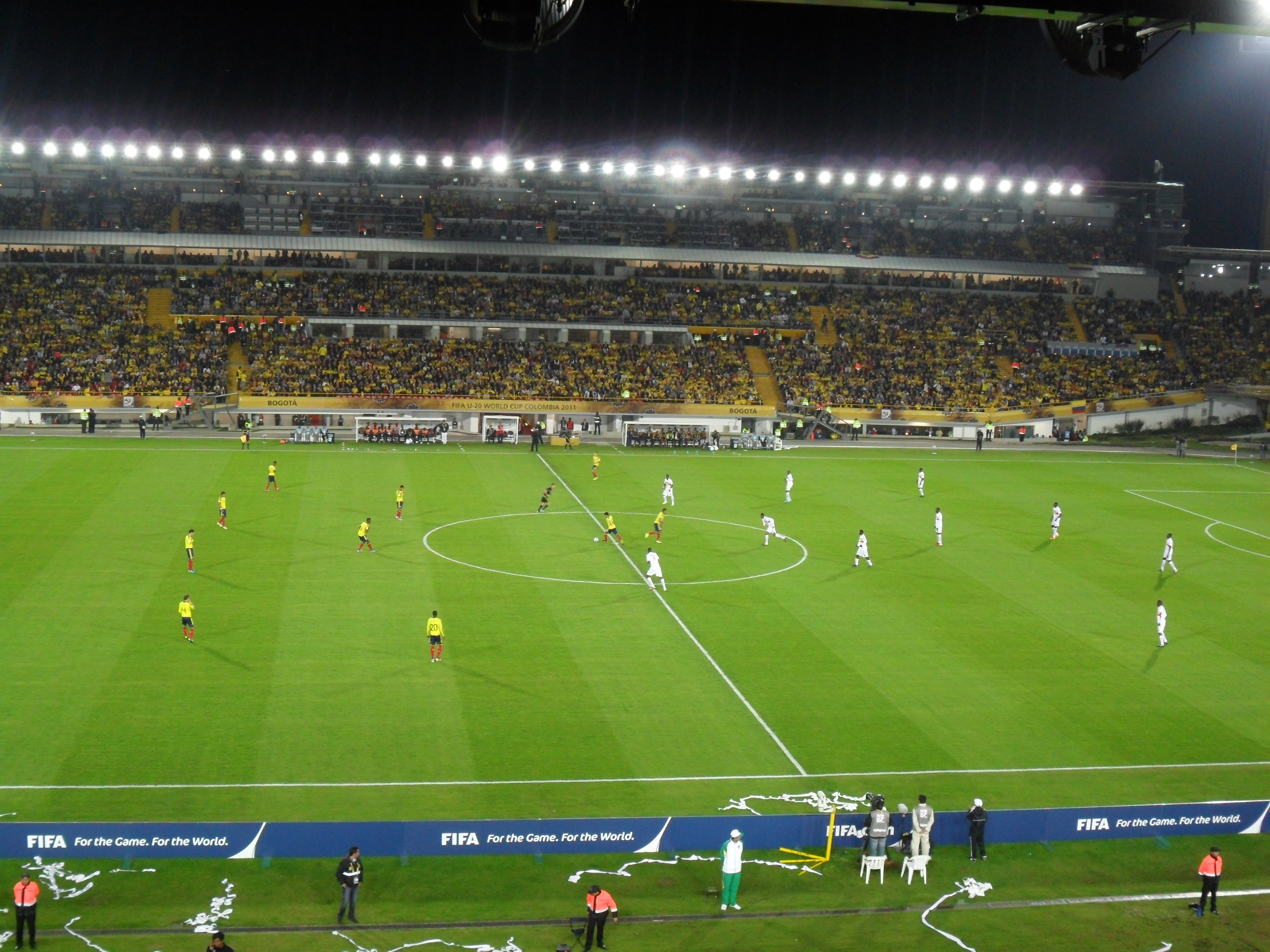 Partido Colombia vs. Malí en el Estadio El Campín, Copa Mundial de Fútbol Sub-20 de 2011